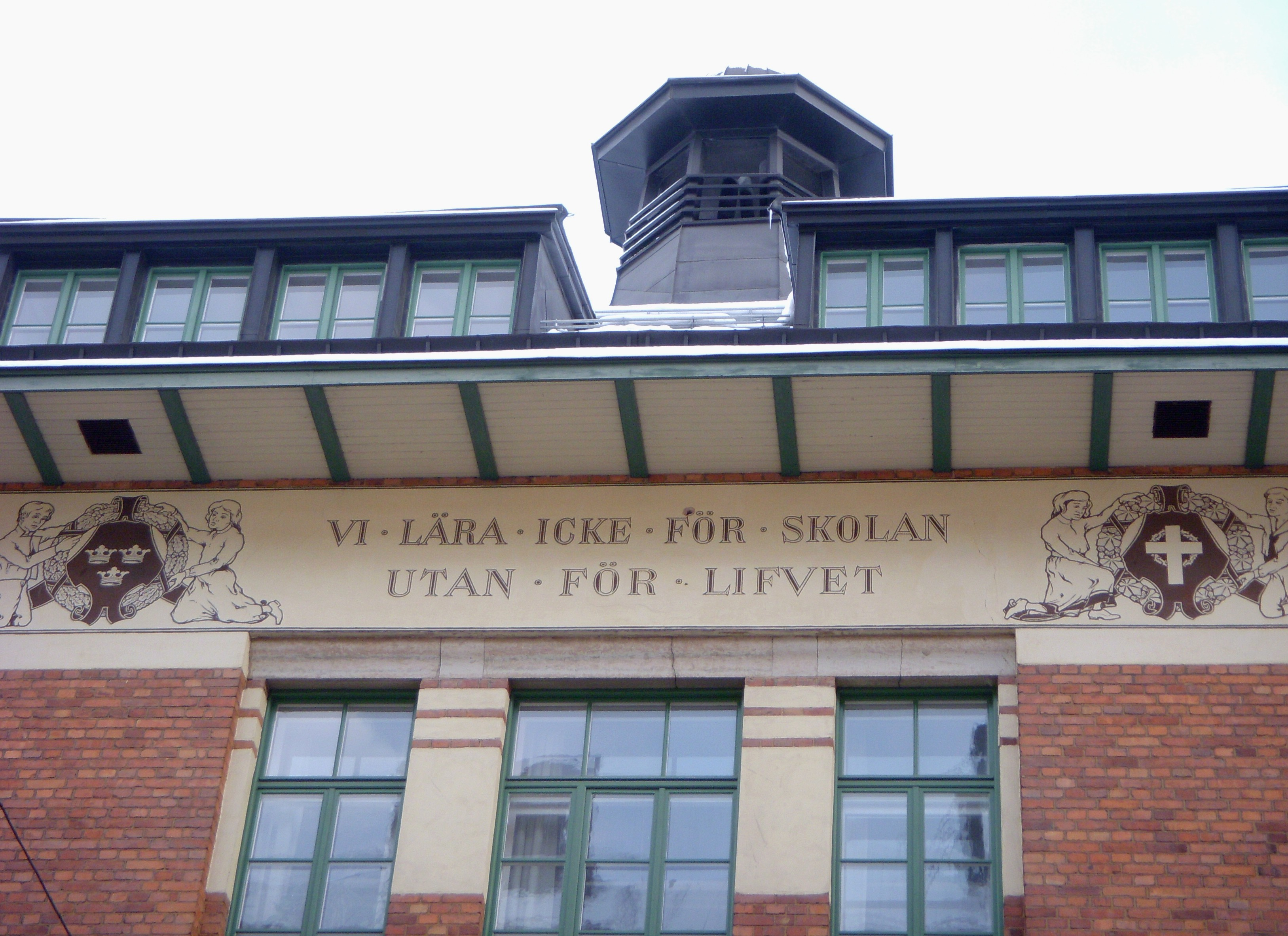 Matteusskolan på Norrmalm i Stockholm, fasaddetalj